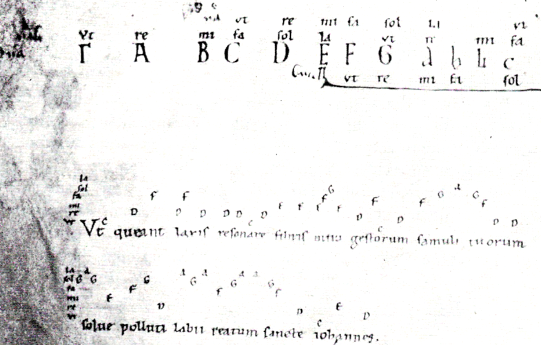 Erste Strophe des Hymnus "Ut queant laxis", Ausschnitt aus einem Blatt einer Traktatensammlung aus St. Emmeram, Regensburg, 11. Jahrhundert. Diastematische Darstellung mit Tonbuchstaben über dem Text und Solmisationssilben am Rand.